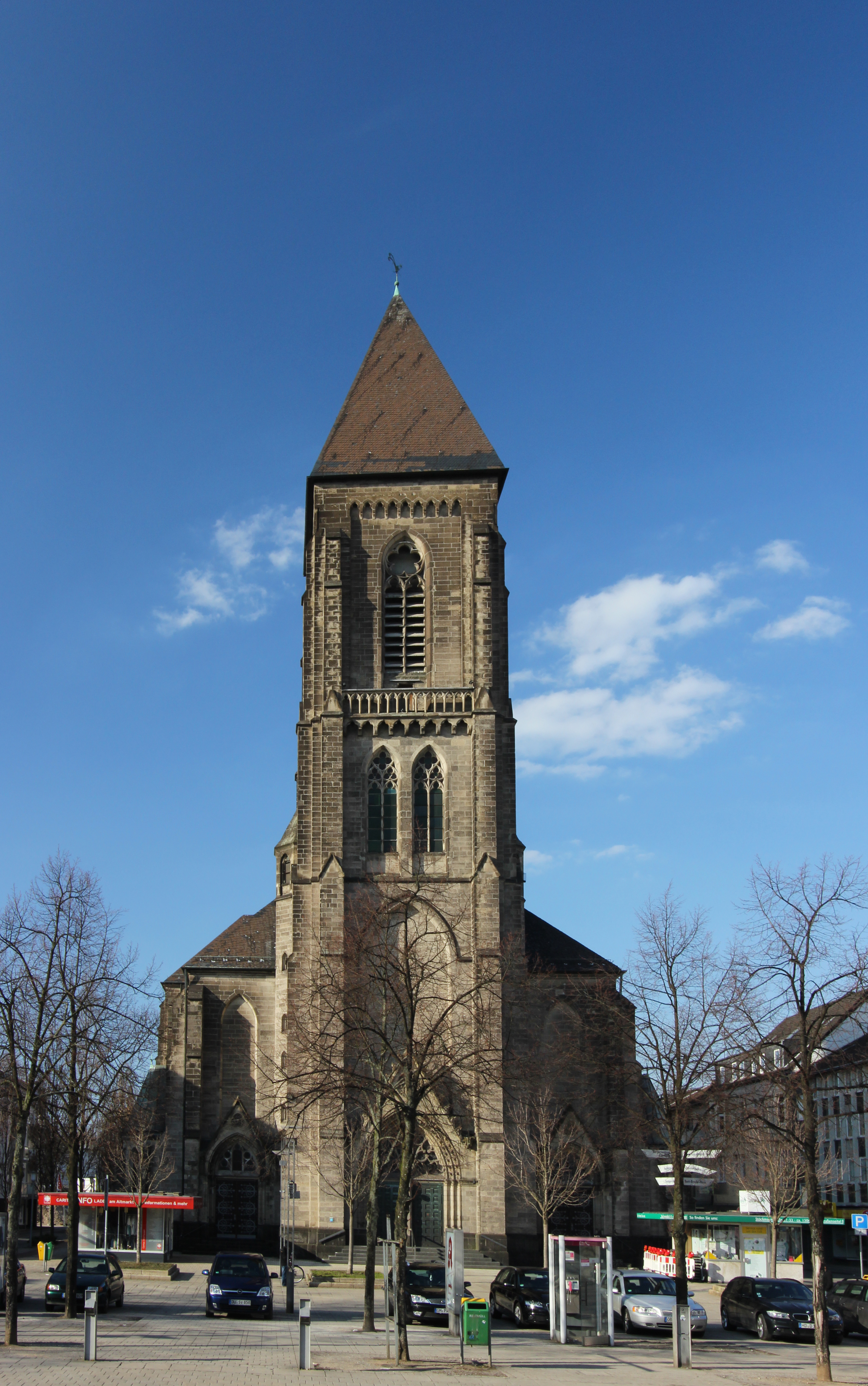 Die Herz-Jesu-Kirche am Altmarkt in Oberhausen, Nordrhein-Westfalen, Deutschland